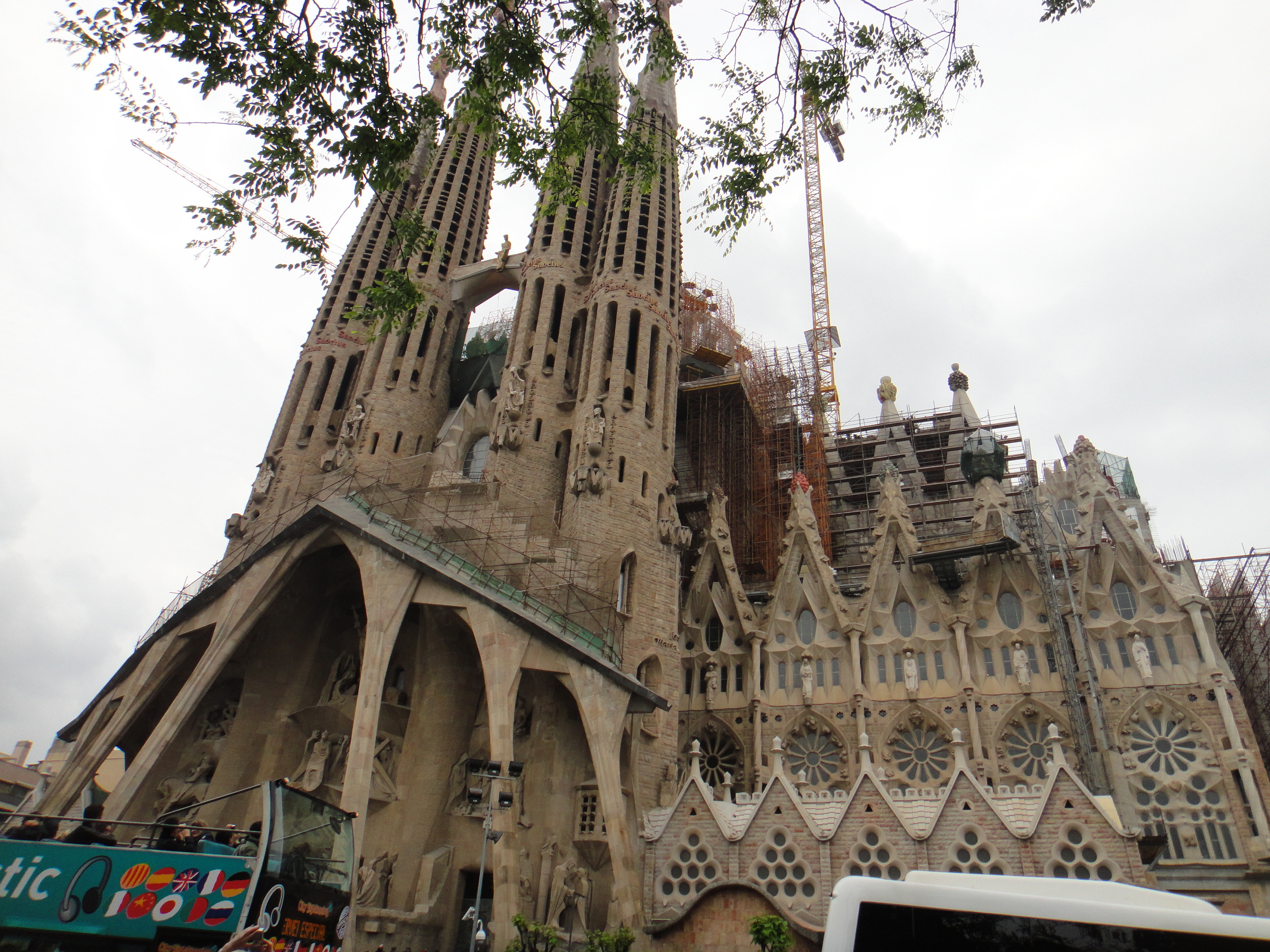 sagrada familia-barcelona